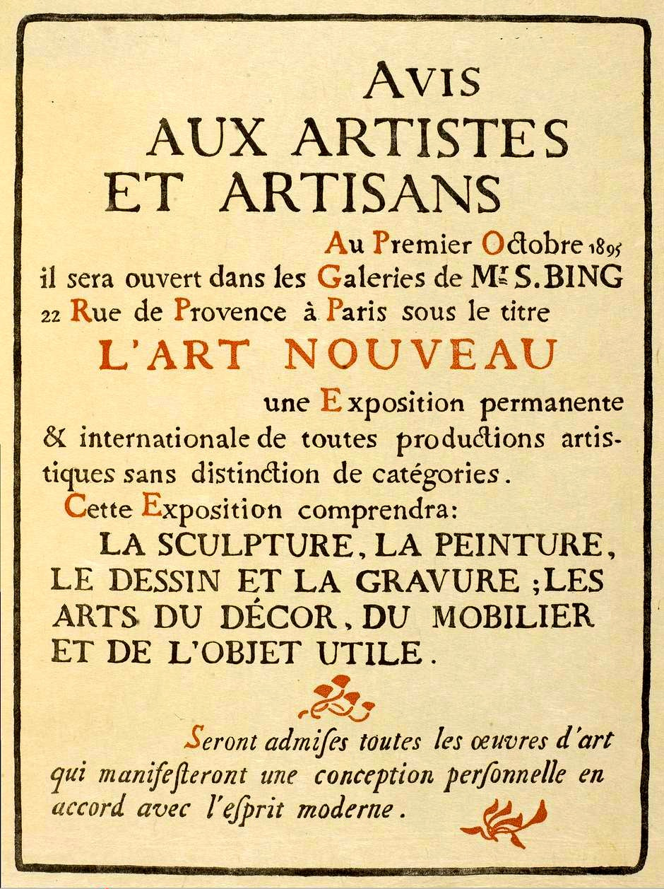 Publicité parue en 1895 dans la revue d’art Pan, pour la galerie d'art de Samuel Bing, 22, rue de Provence à Paris